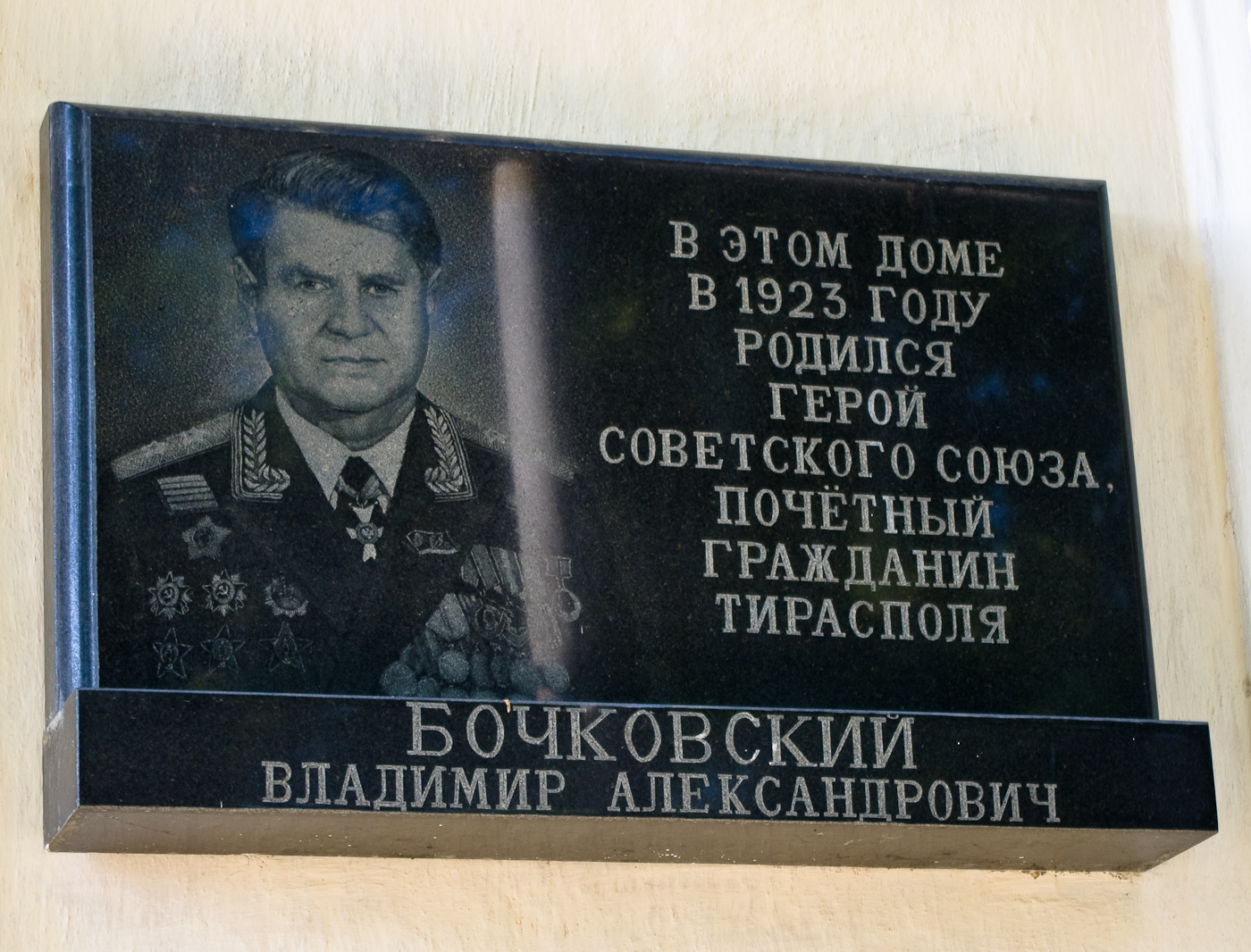 Памятная доска на доме в Тирасполе, где родился Владимир Александрович